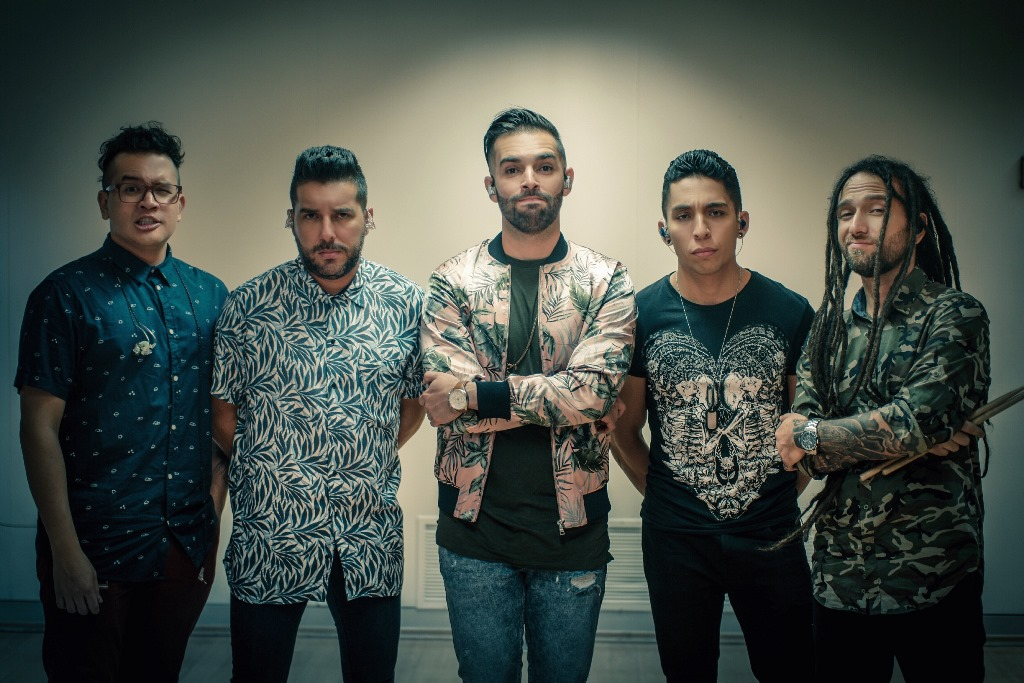 Alkilados antes de un show en Guayaquil